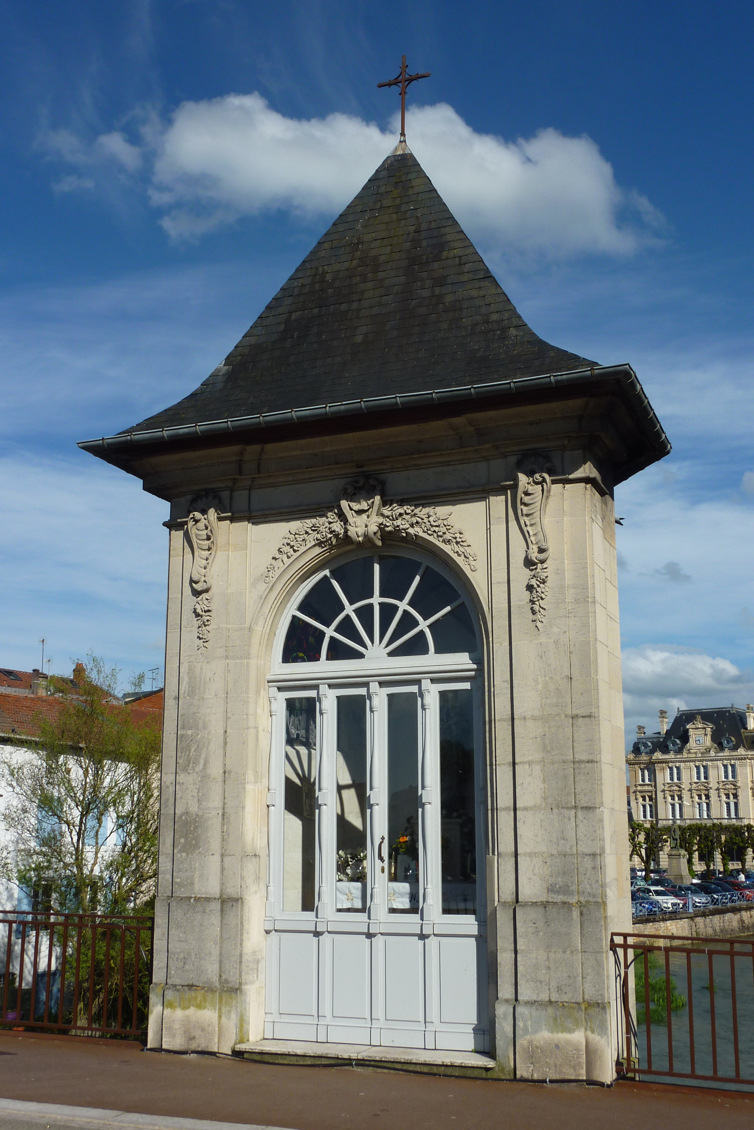 Chapelle-oratoire dédiée à Notre-Dame-de-la-Paix située sur le pont Notre-Dame de Bar-le-Duc.